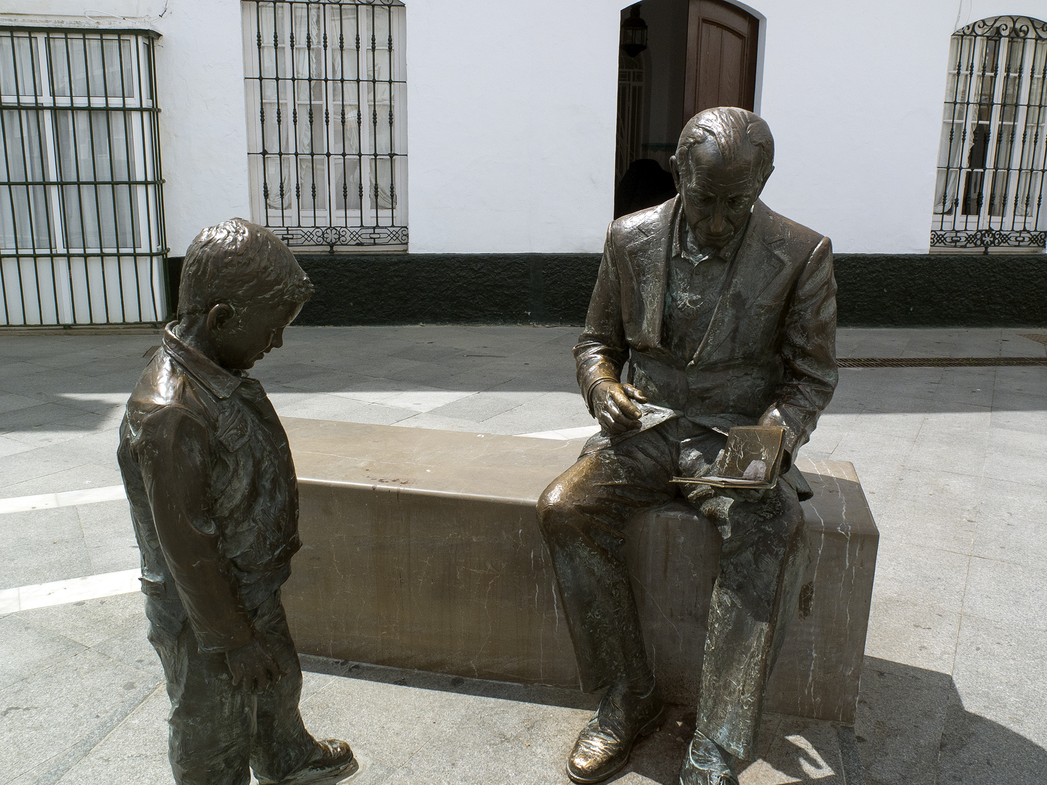 Estatua de José Saramago en Conil de la Frontera, leyendo un libro a un niño, realizada por el escultor Augusto Arana.